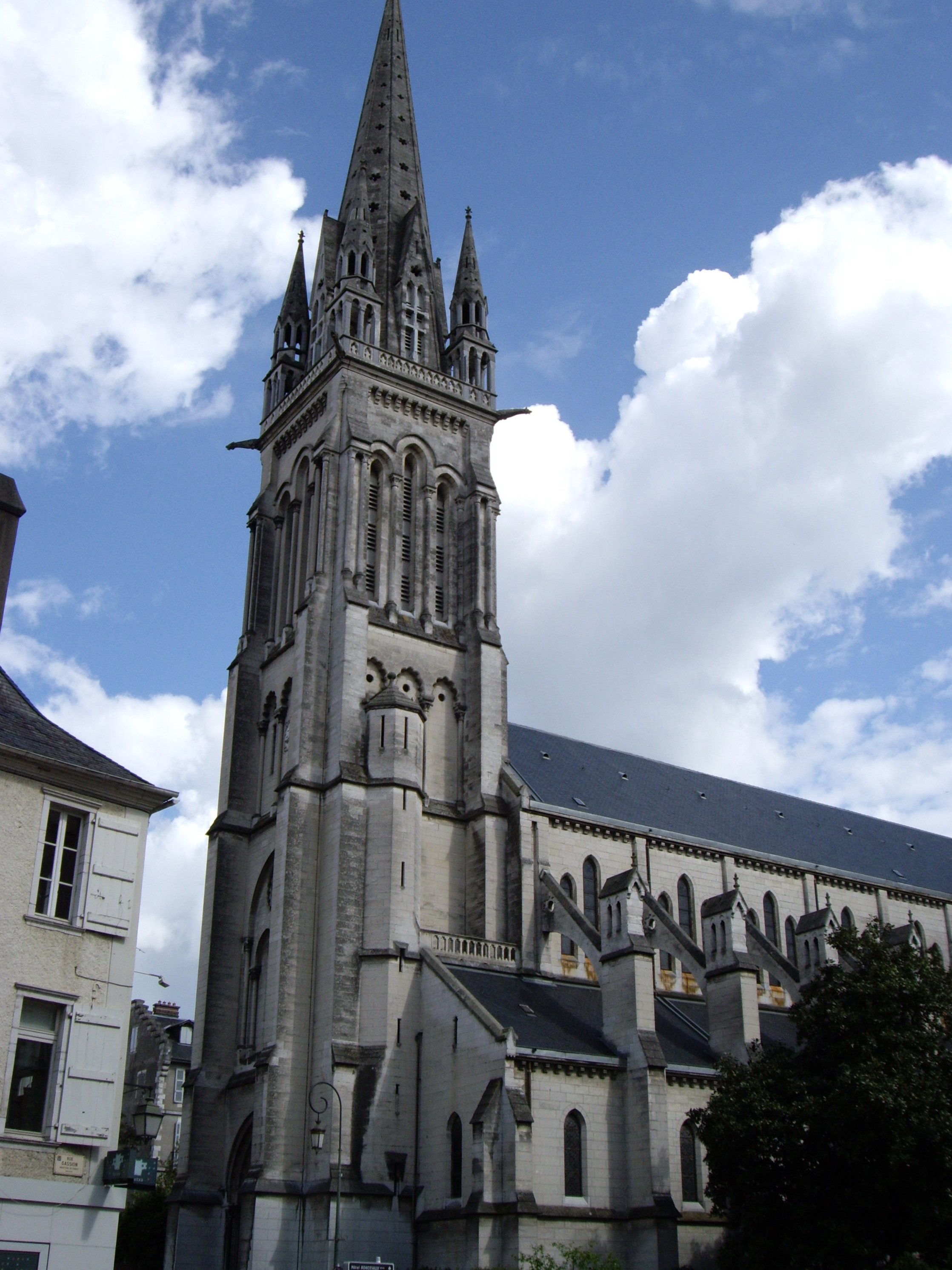 église Saint Martin (Pau, 64)